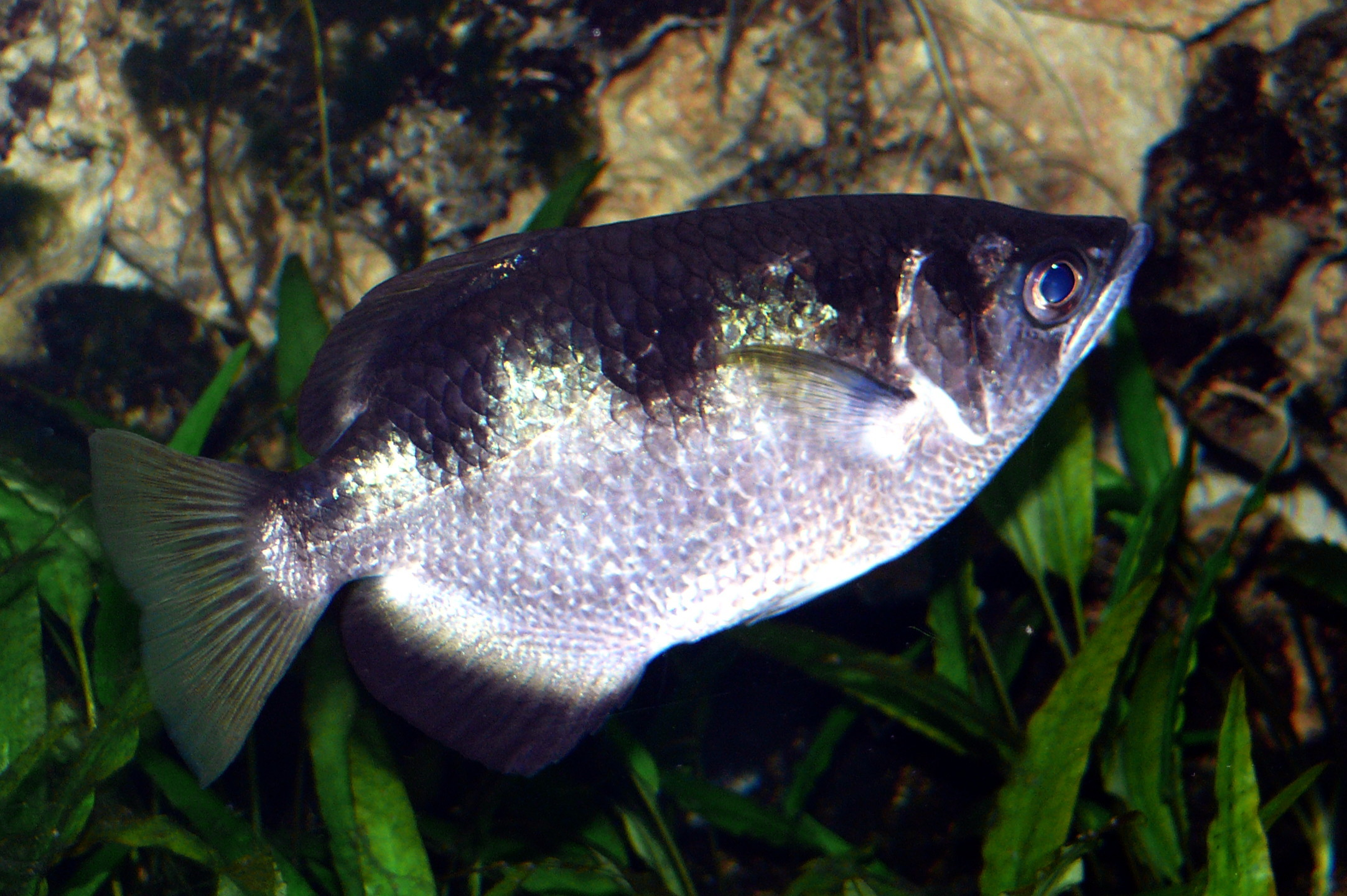 Schützenfisch (Toxotes jaculatrix)